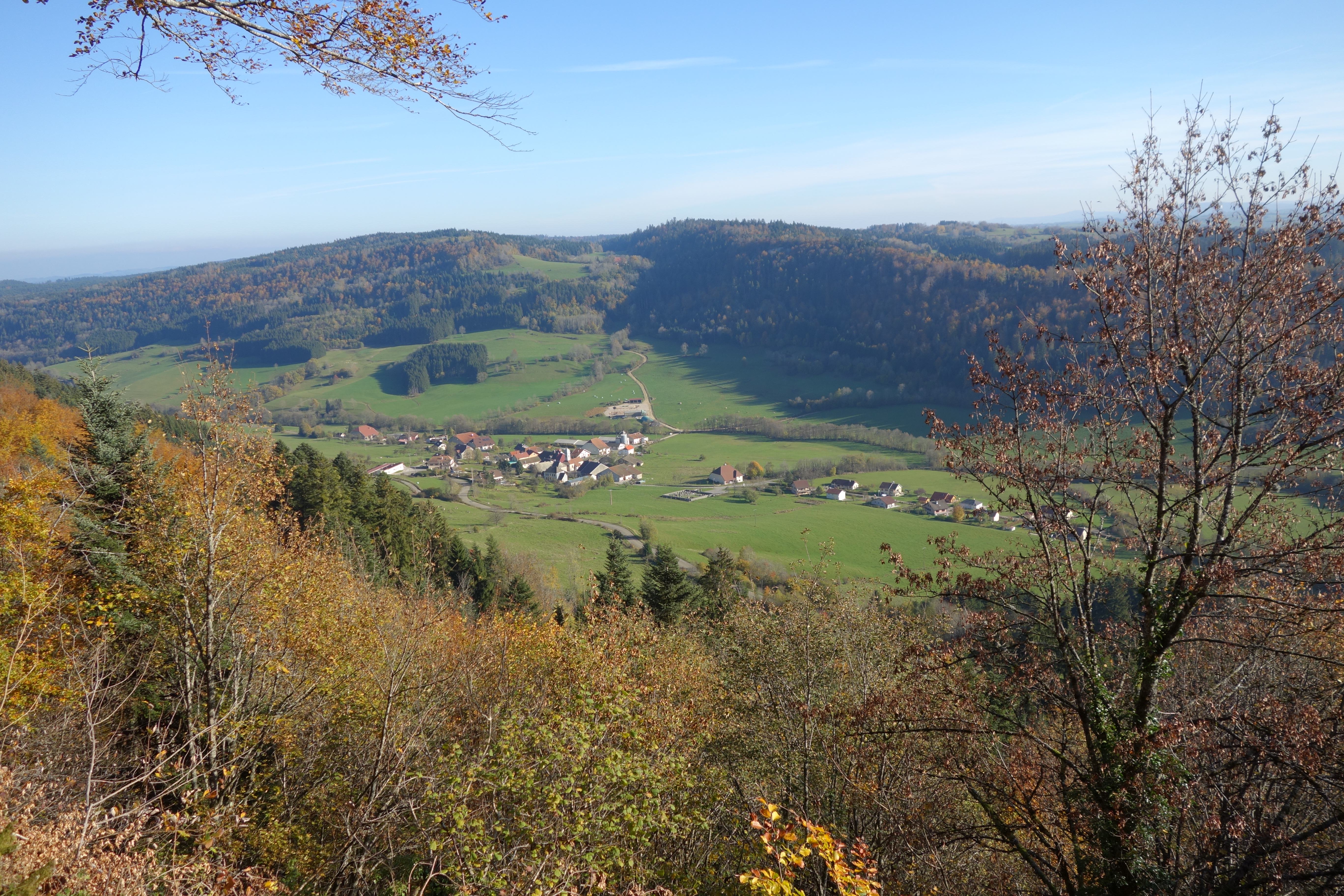 Les Nans (Jura) - site général dans la combe depuis le belvédère du Signal dans la forêt de la Fresse